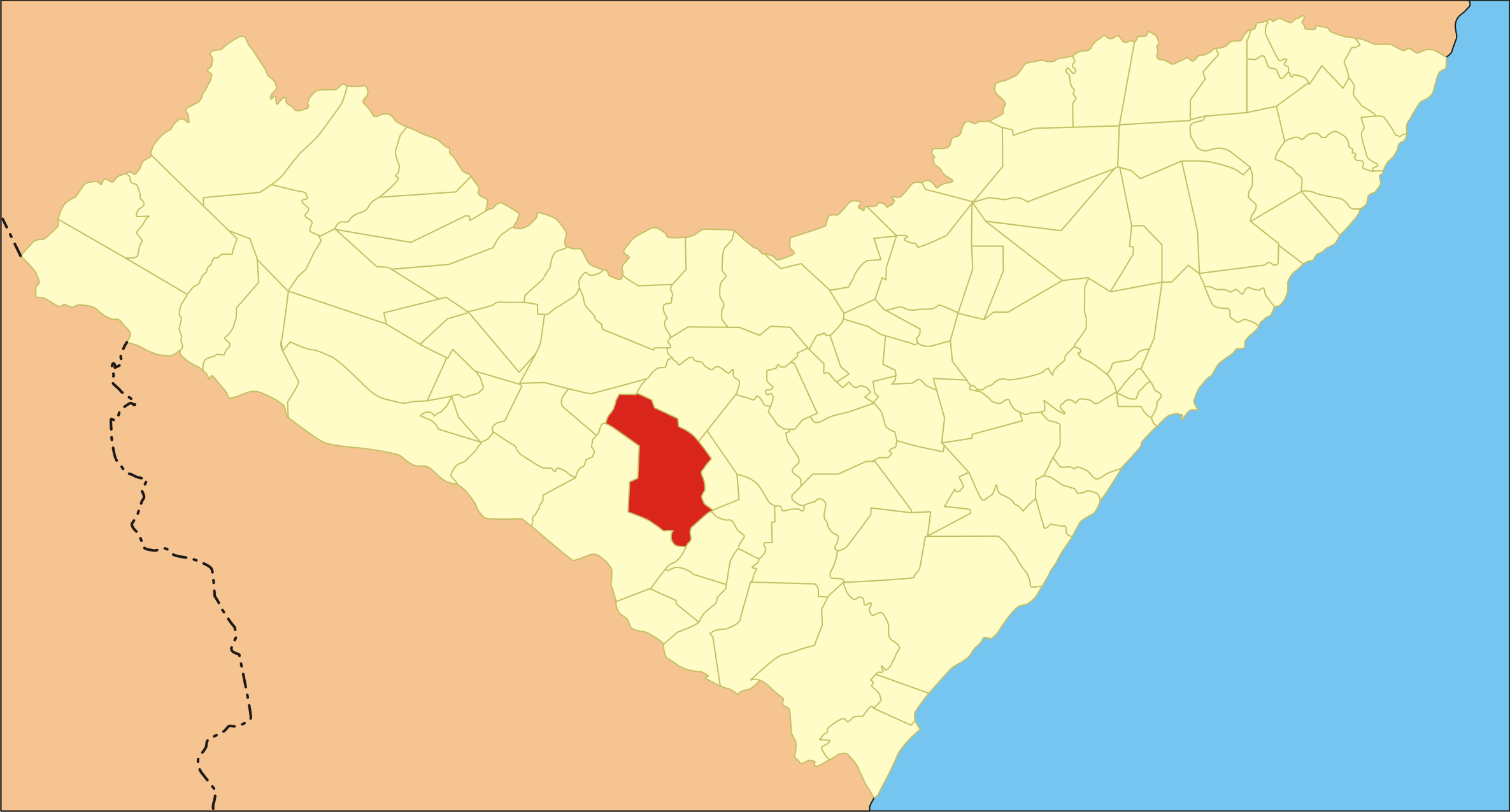 Localização da cidade em Alagoas